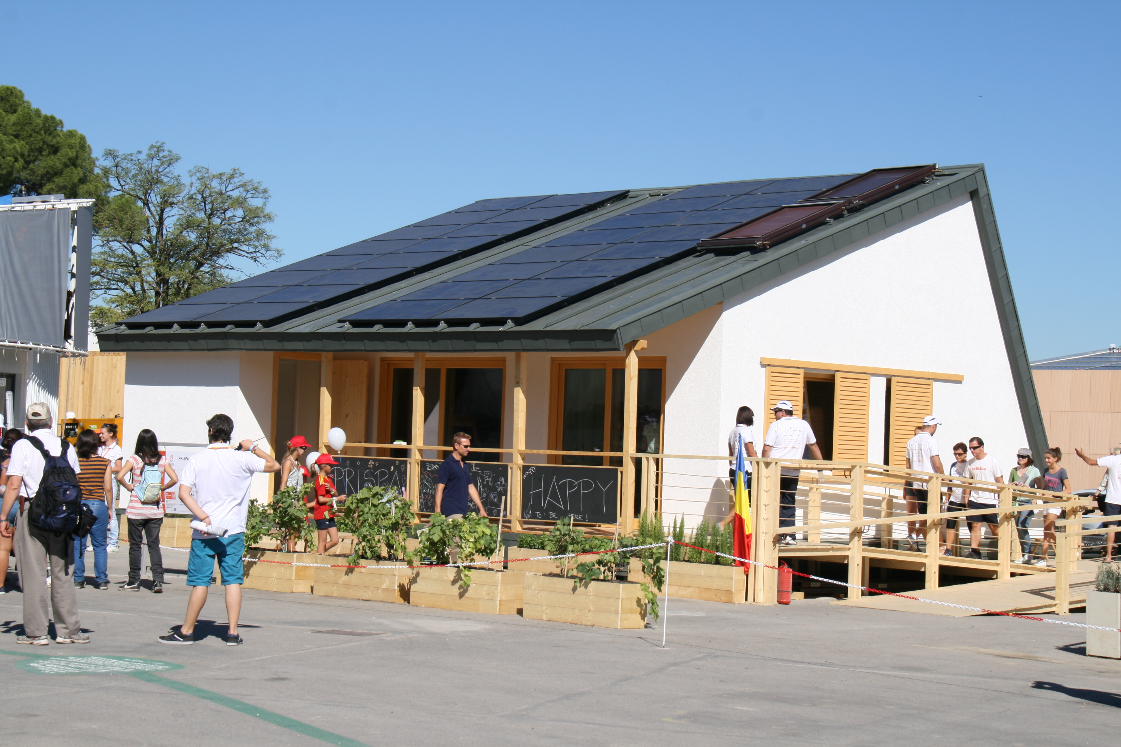 Prispa - Romania